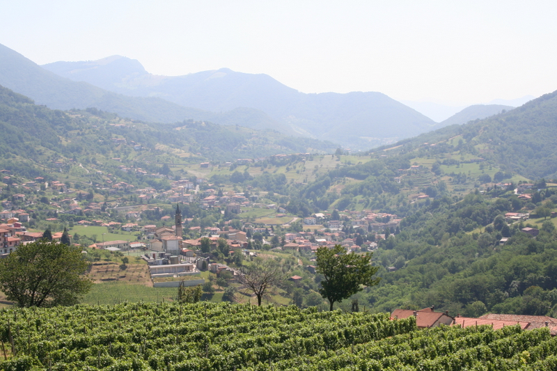 Foresto Sparso (BG), dall'alto, panorama.